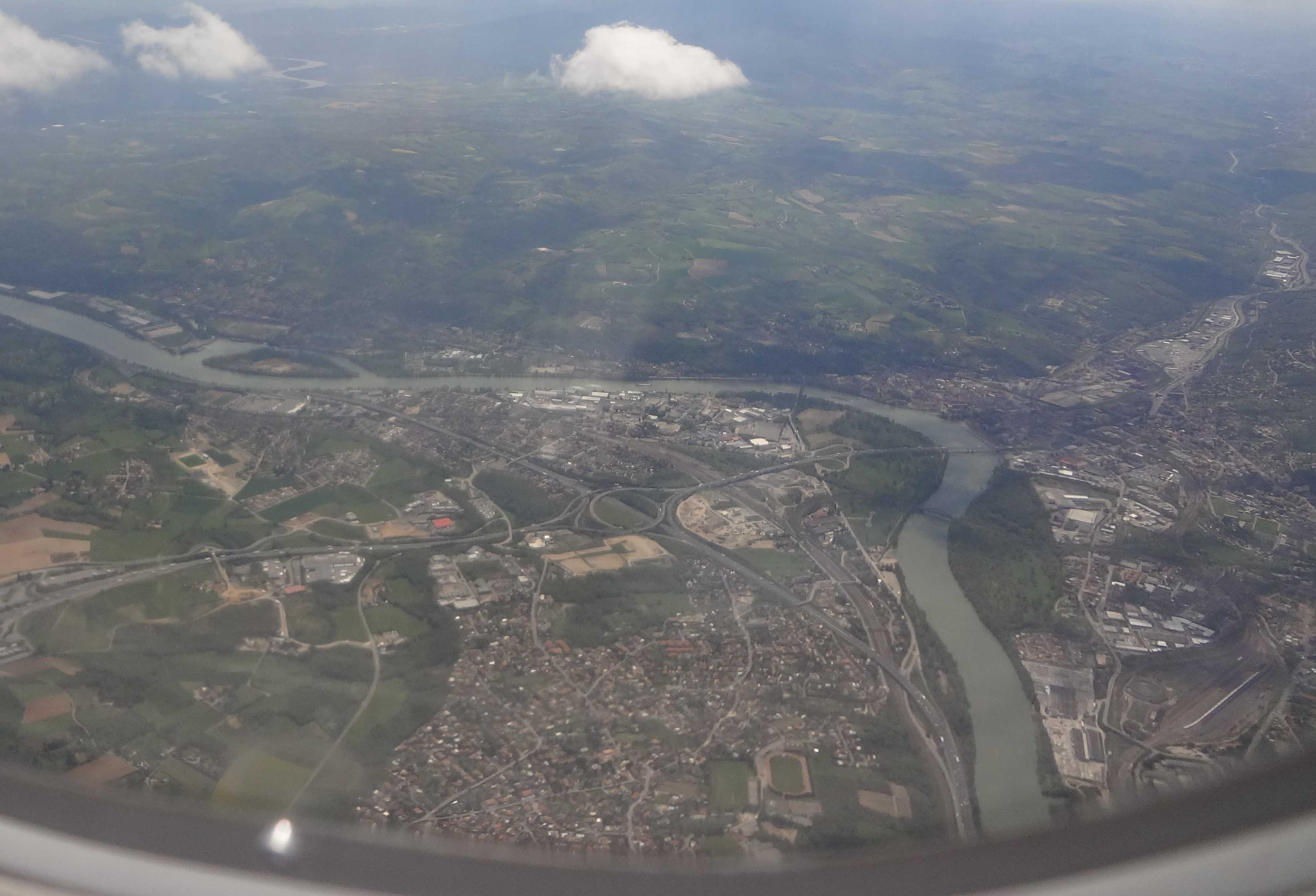 Vue aerienne de Chasse-sur-Rhone et de givors.